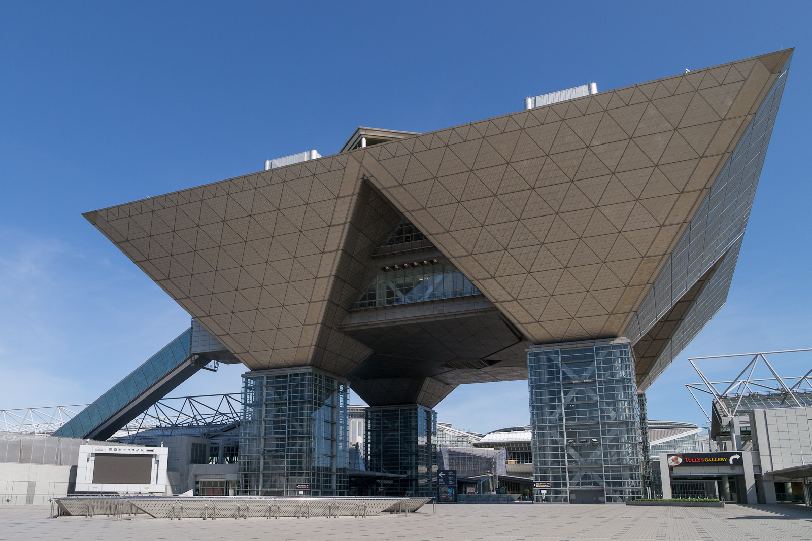 国際展示場「東京ビッグサイト」、東京都江東区。